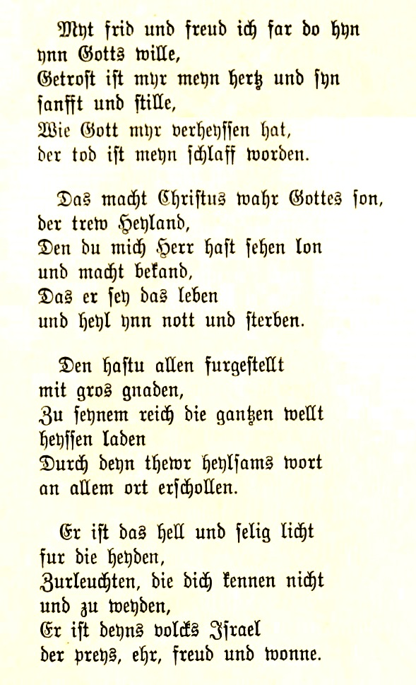 Martin Luther: Mit Fried und Freud ich fahr dahin, Urtext 1524